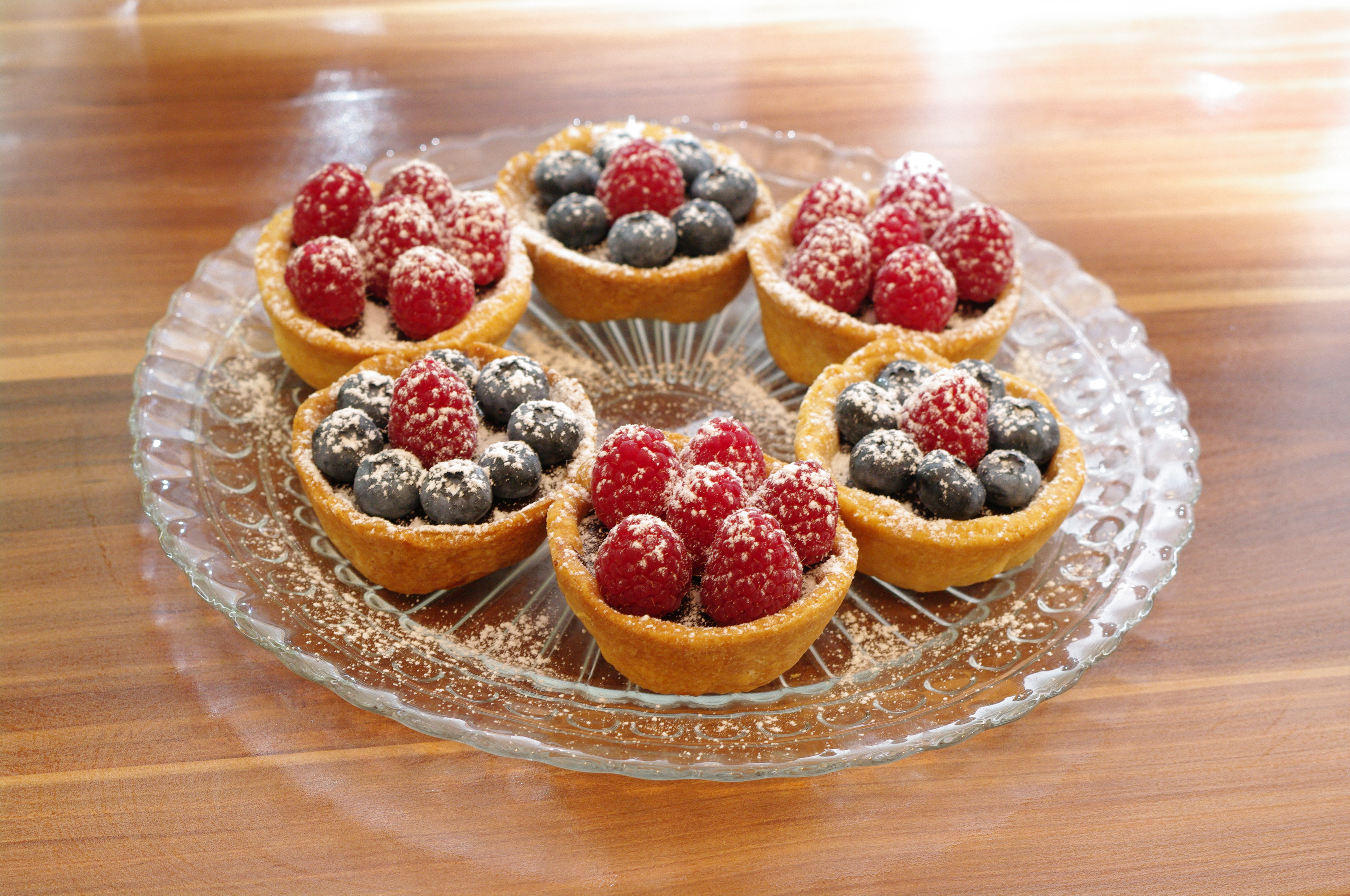 Schokoladen Tartes mit Heidelbeeren und Himbeeren